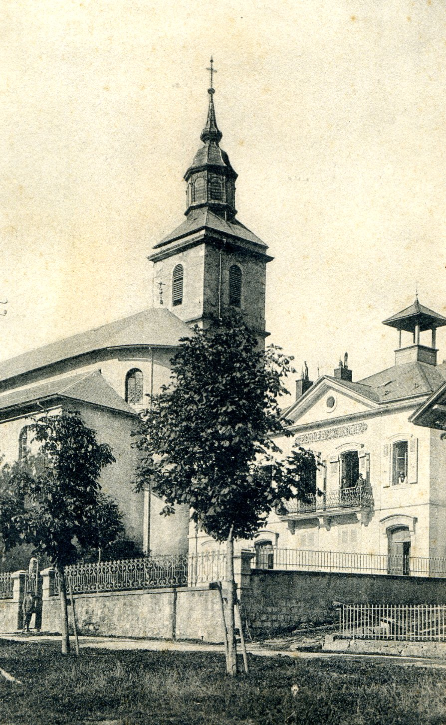 Eglise Vailly (74)